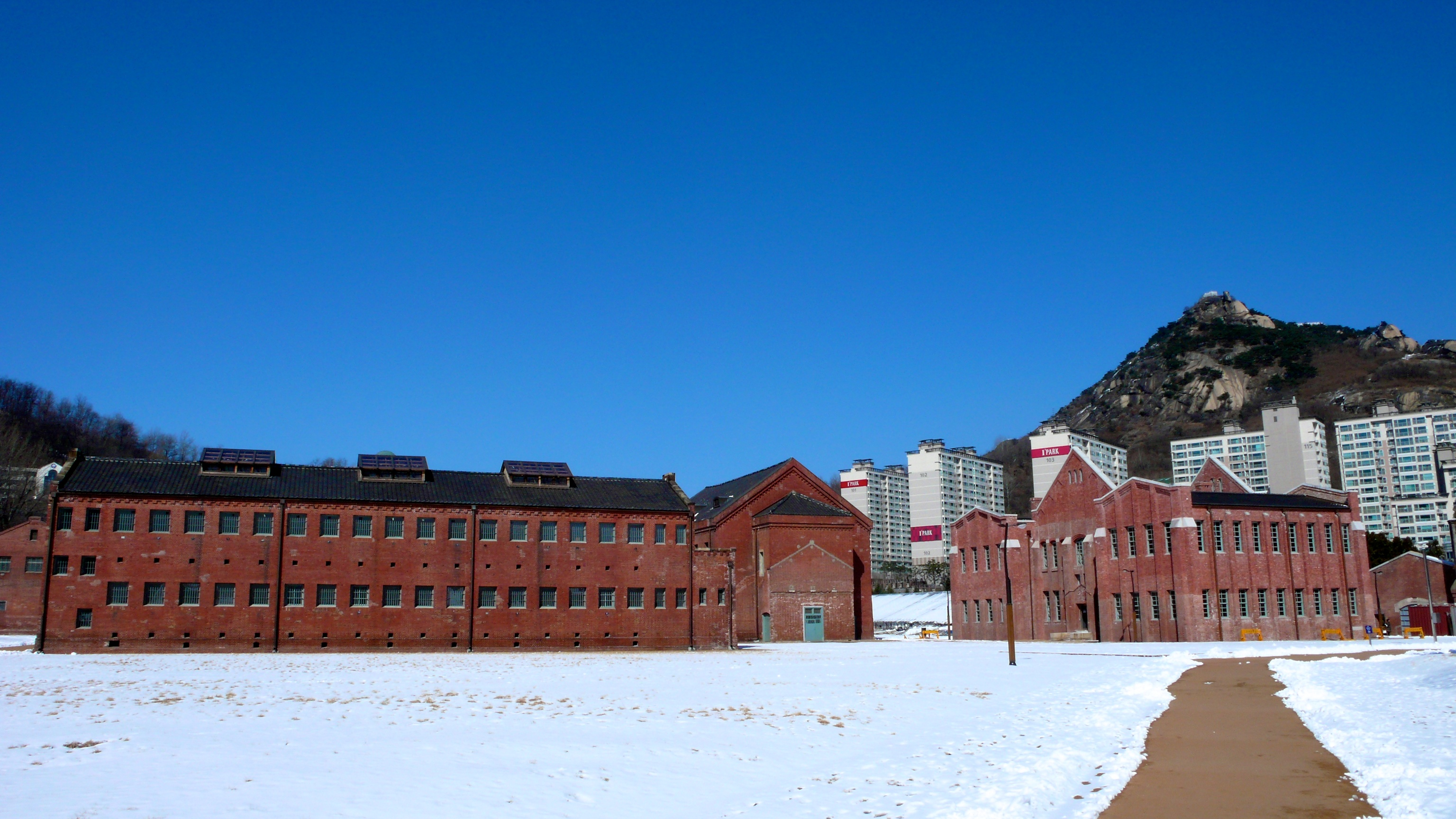 Seodaemun Prison Barracks